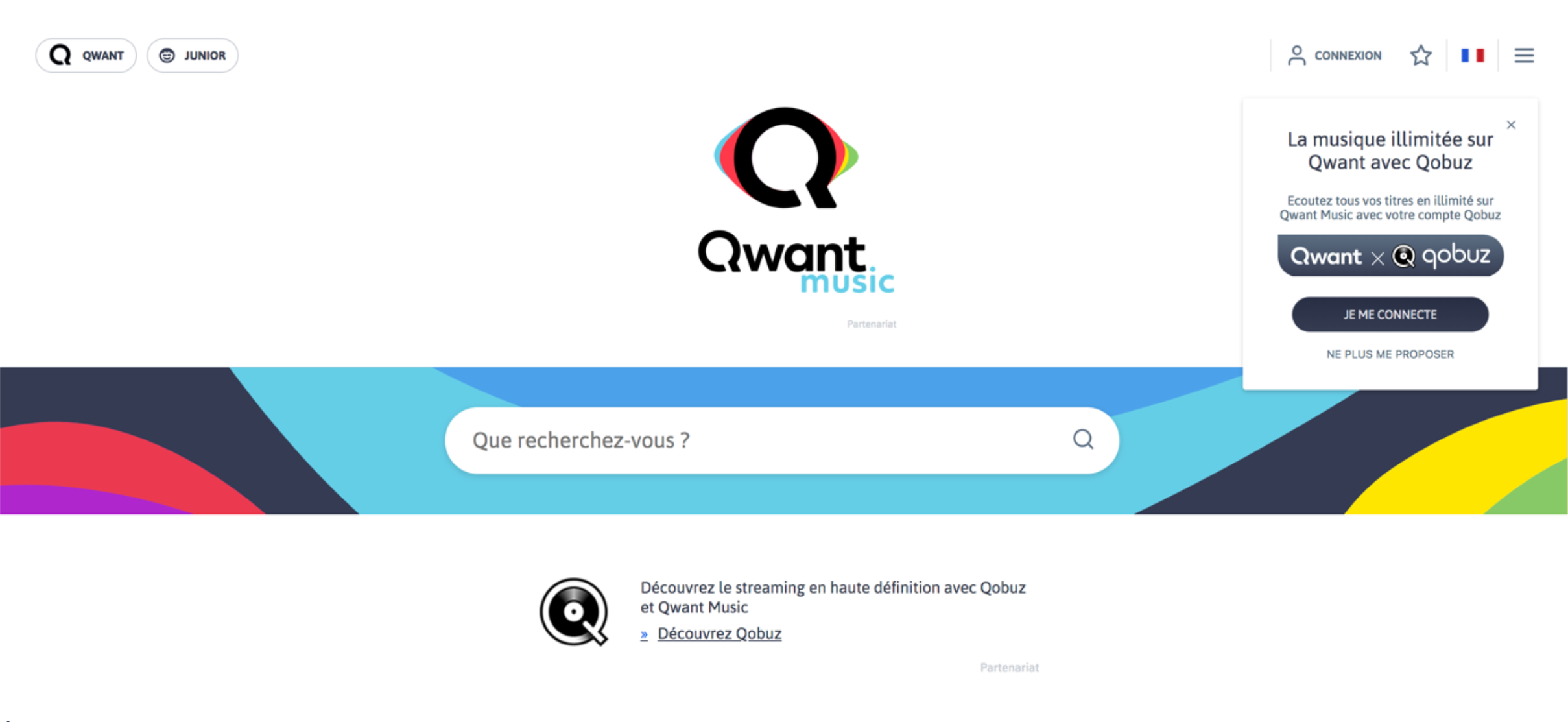 Page d'accueil de Qwant Music